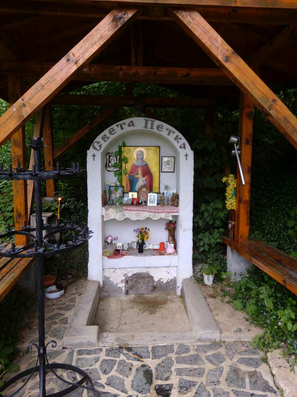 Аязмото "Света Петка" в Джинчовци